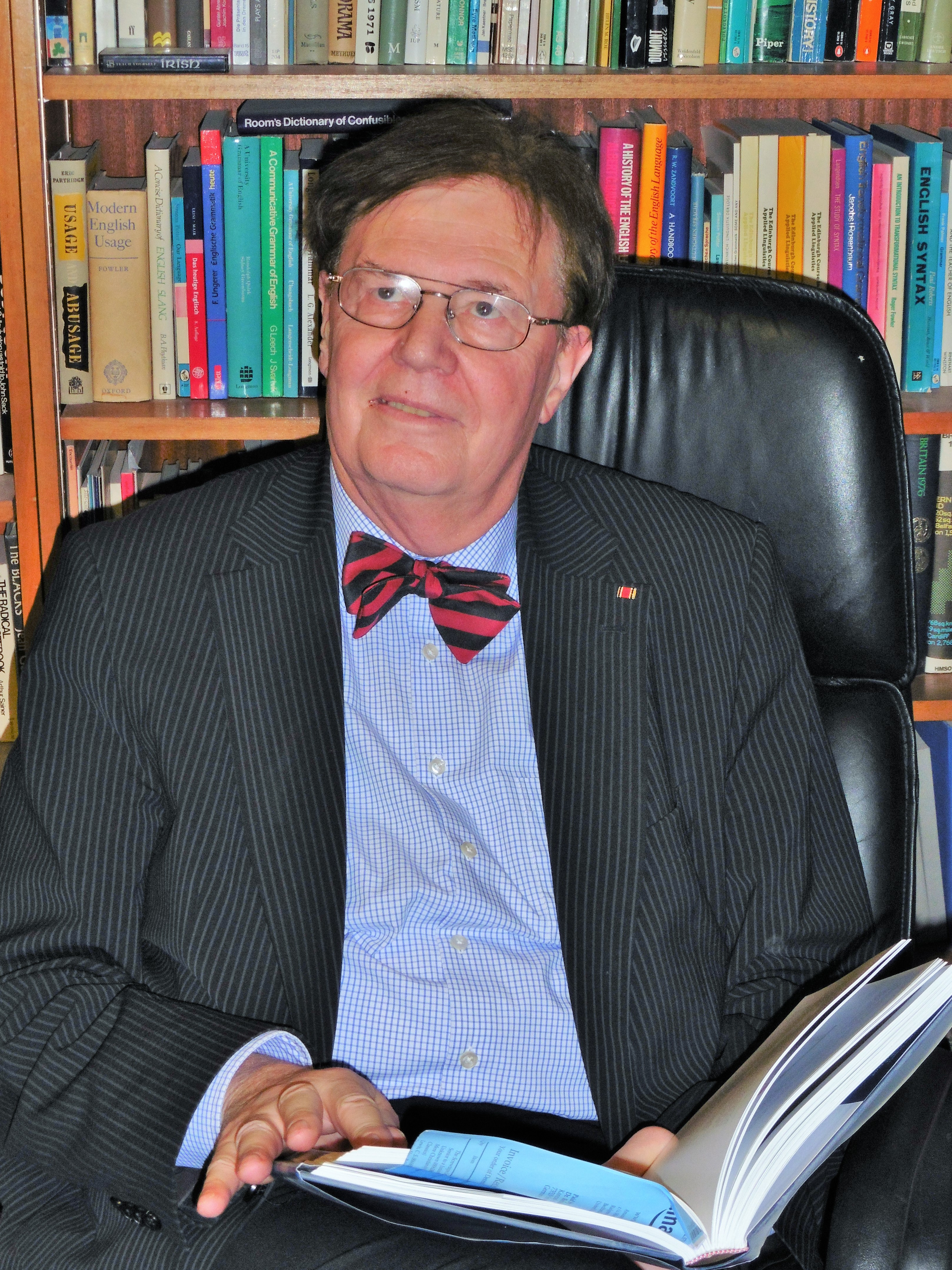 Reinhard Kuhnert (Pädagoge)